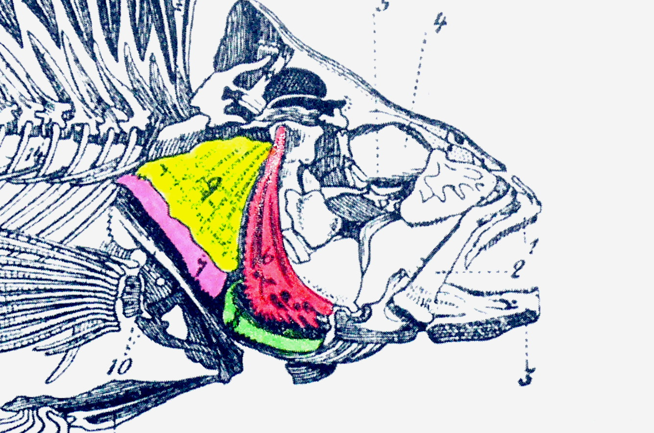 Operculum (gelb), Praeoperculum (rot), Interoperculum (grün) und Suboperculum (pink) Original caption: "Fig. 228. Kiemendeckelknochen: Originator: Hubert Ludwig Source: Schul-Naturgeschichte 1891